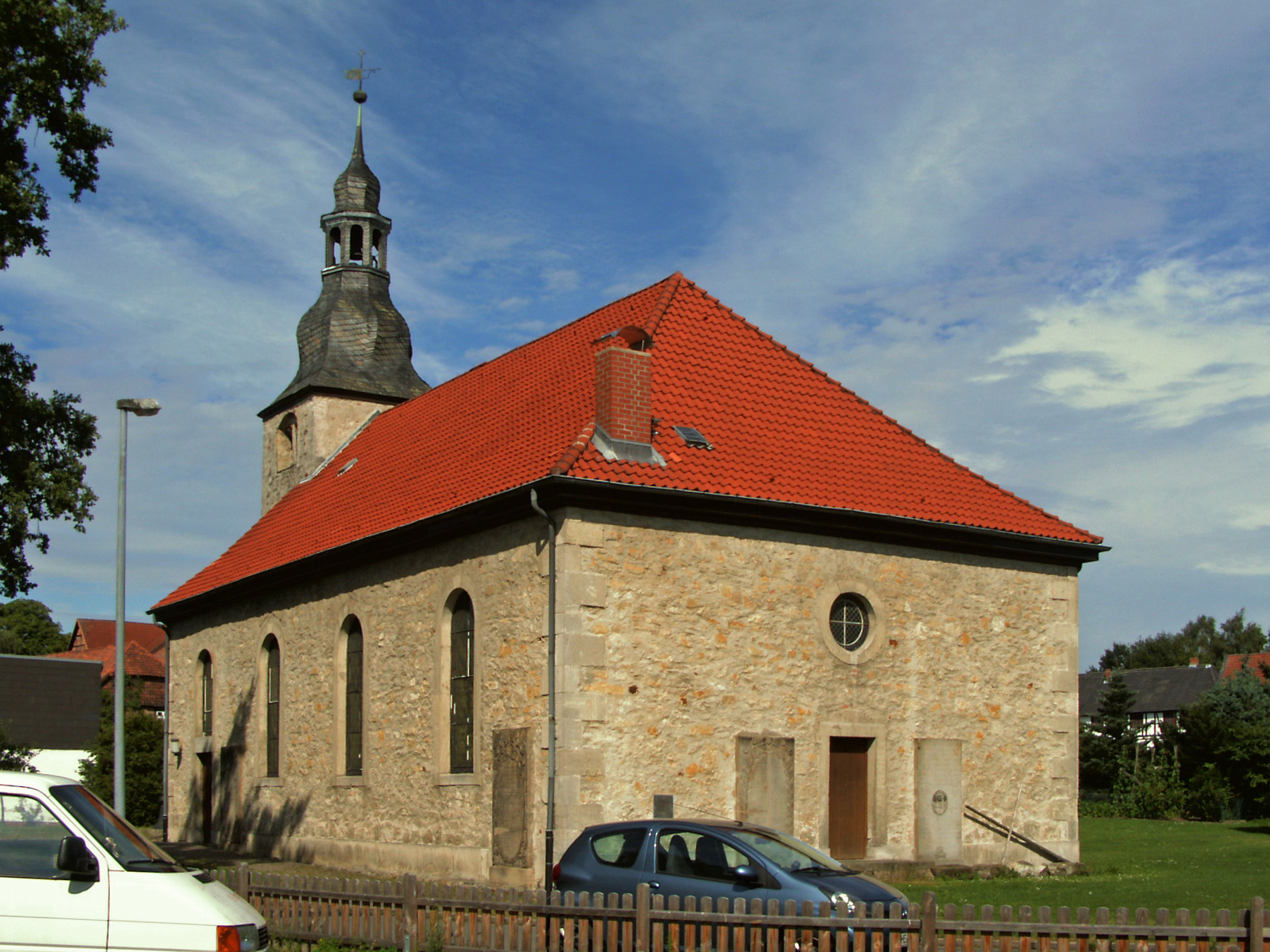 Evangelische Kirche "Heiligkreuz" in Flechtorf, Landkreis Helmstedt